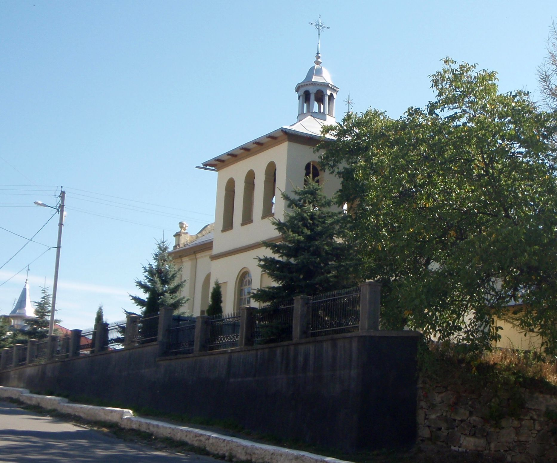 Кути, вірменська церква